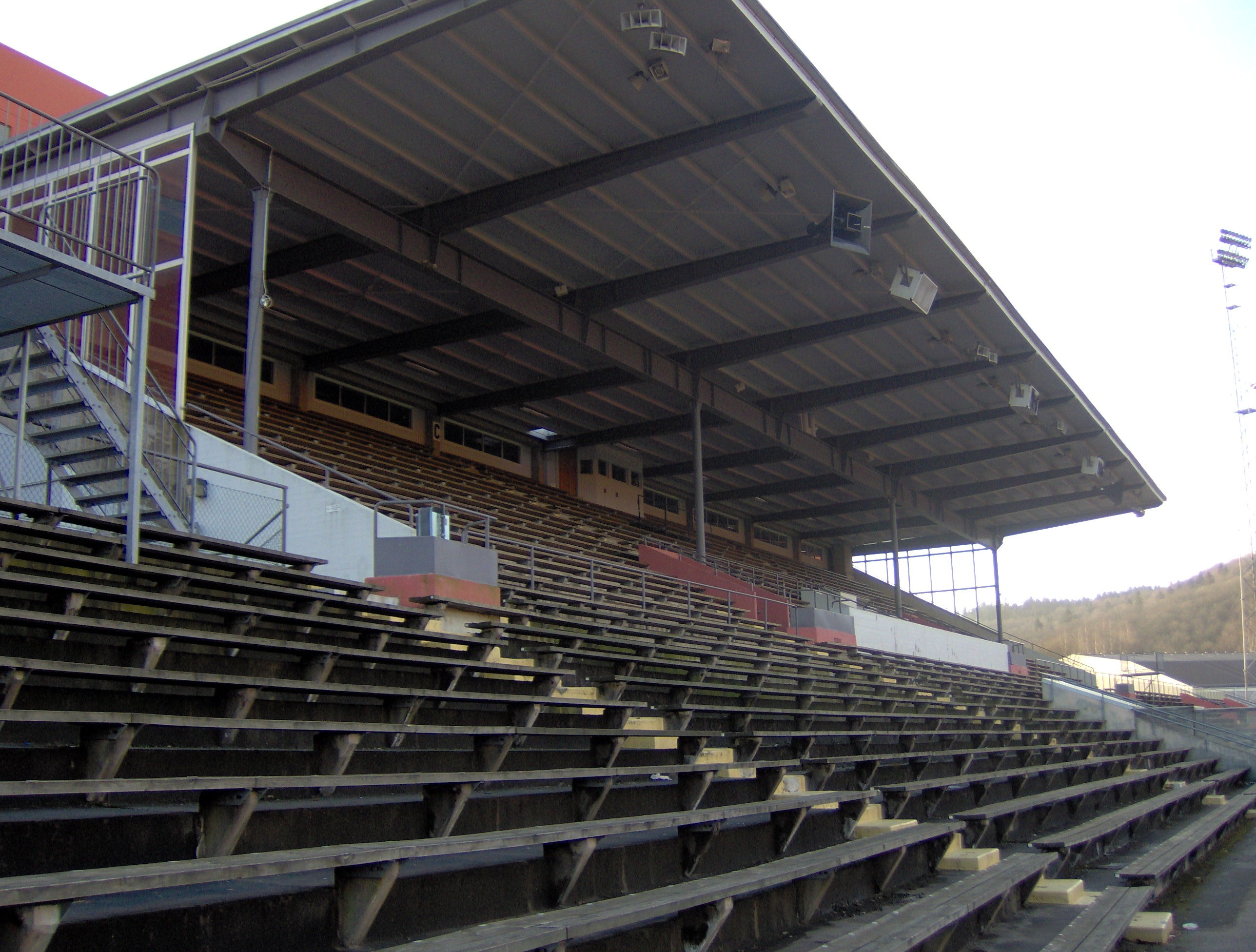 Ryavallen, main stand.